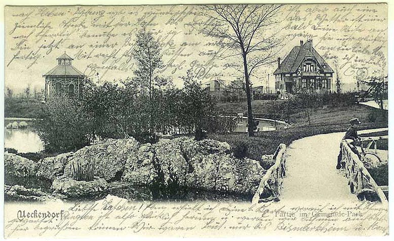 Postkarte des Von-Wedelstaedt-Parks (Südpark) in Gelsenkirchen-Ückendorf